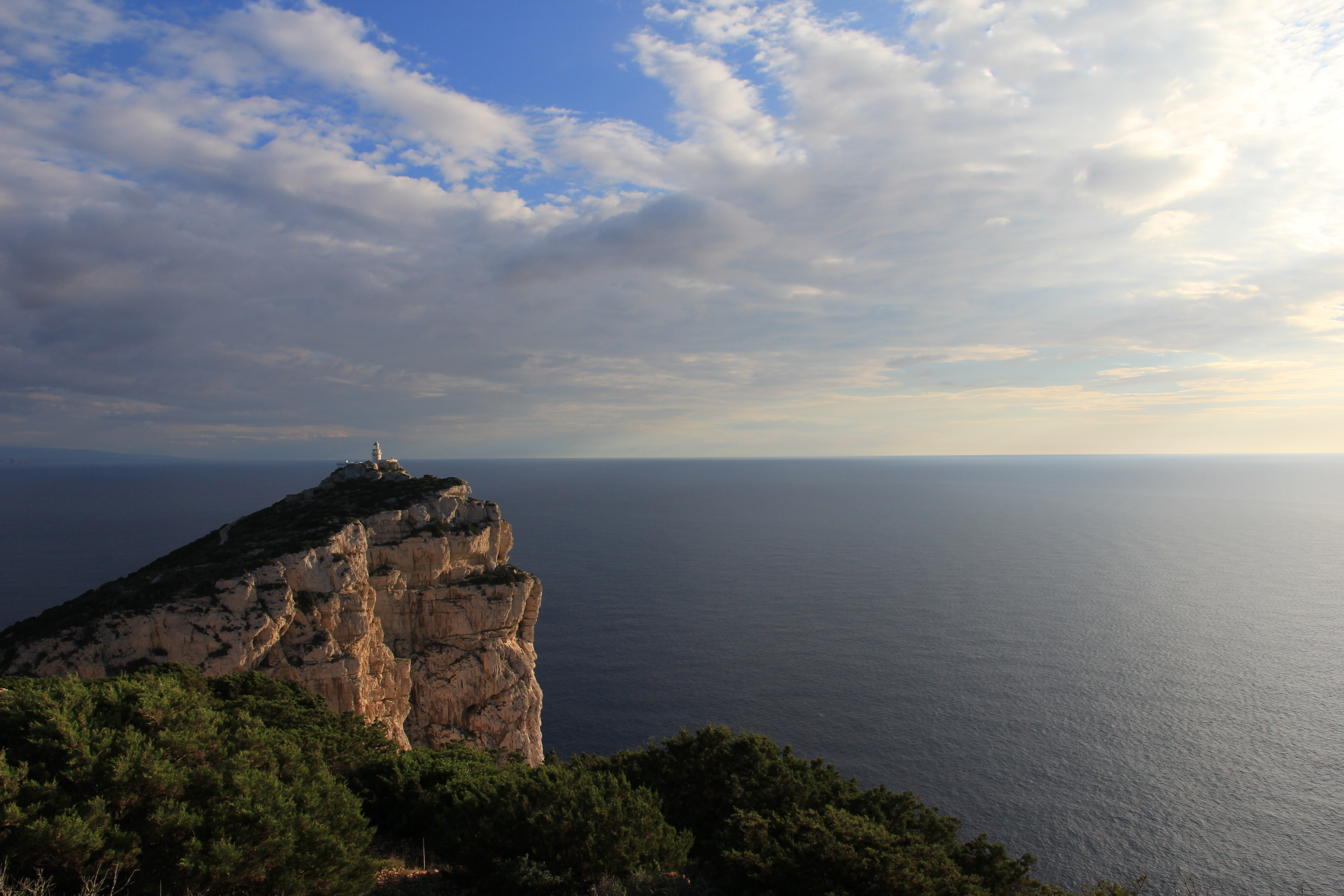 Alghero